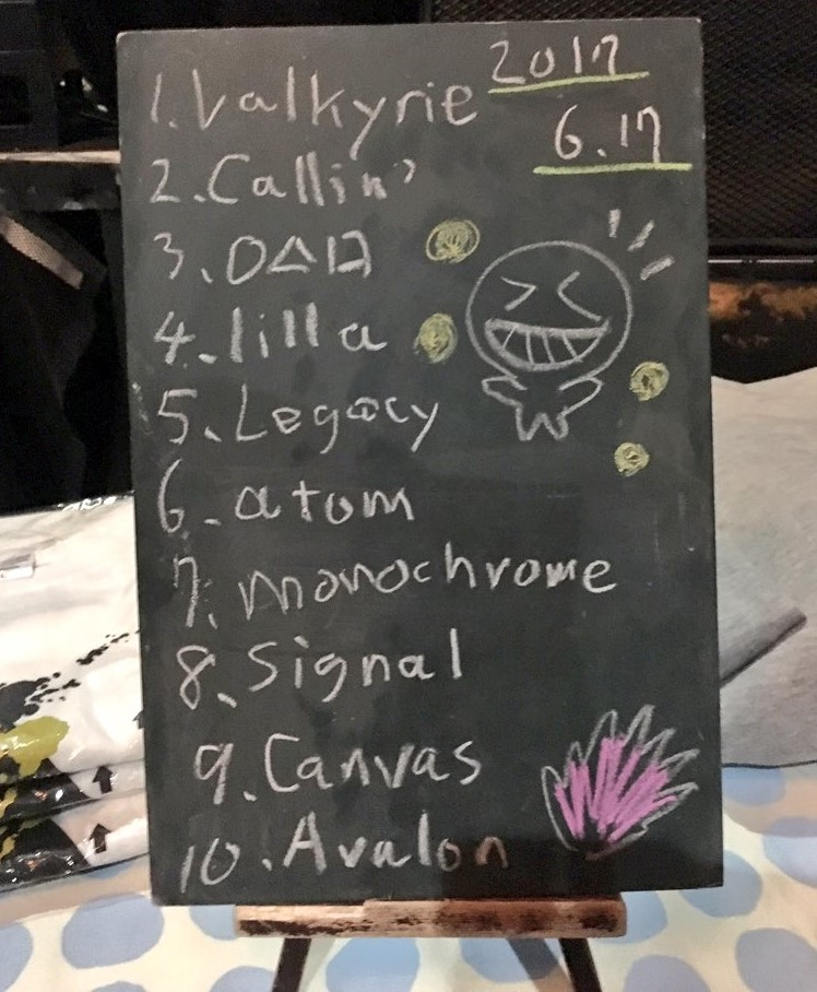 amiinAセトリボード(20170617(2))